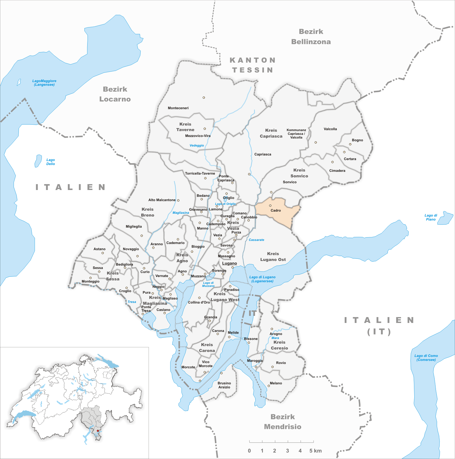 Municipality Cadro